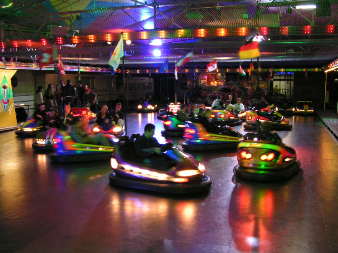 Autoscooter Barth, Trier Altstadtfest